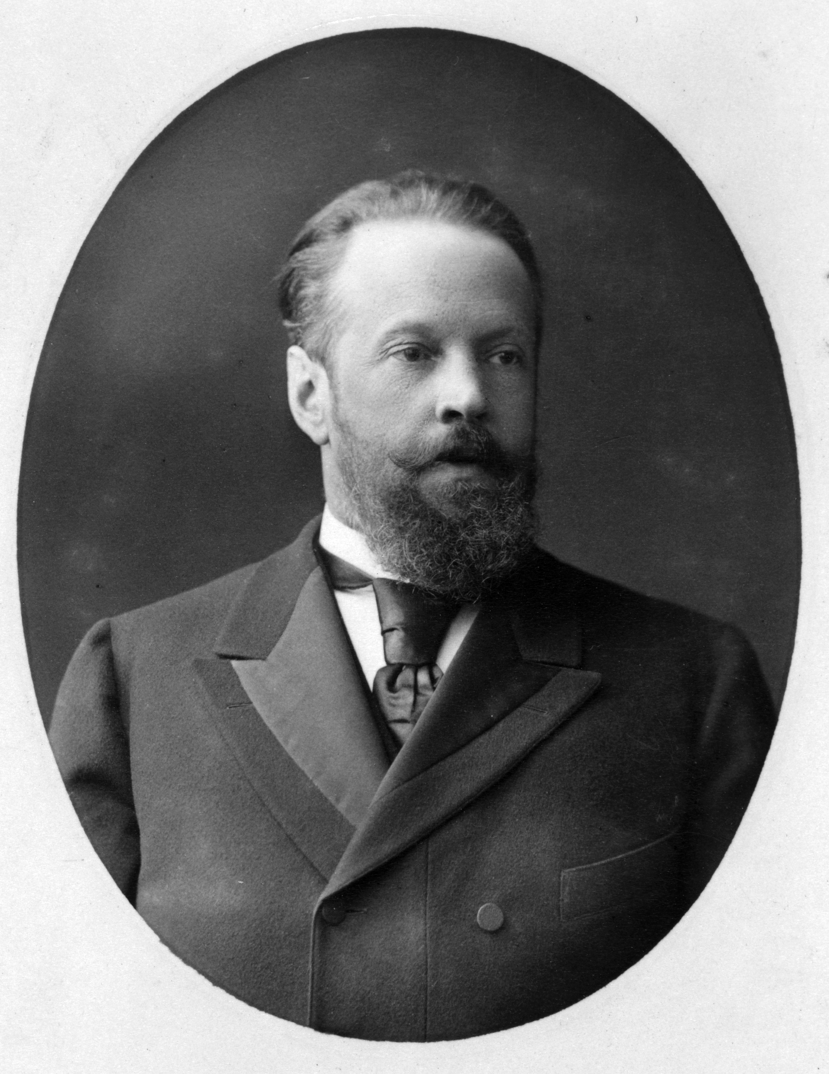 Retrato de Serguéi Witte en la década de 1880.